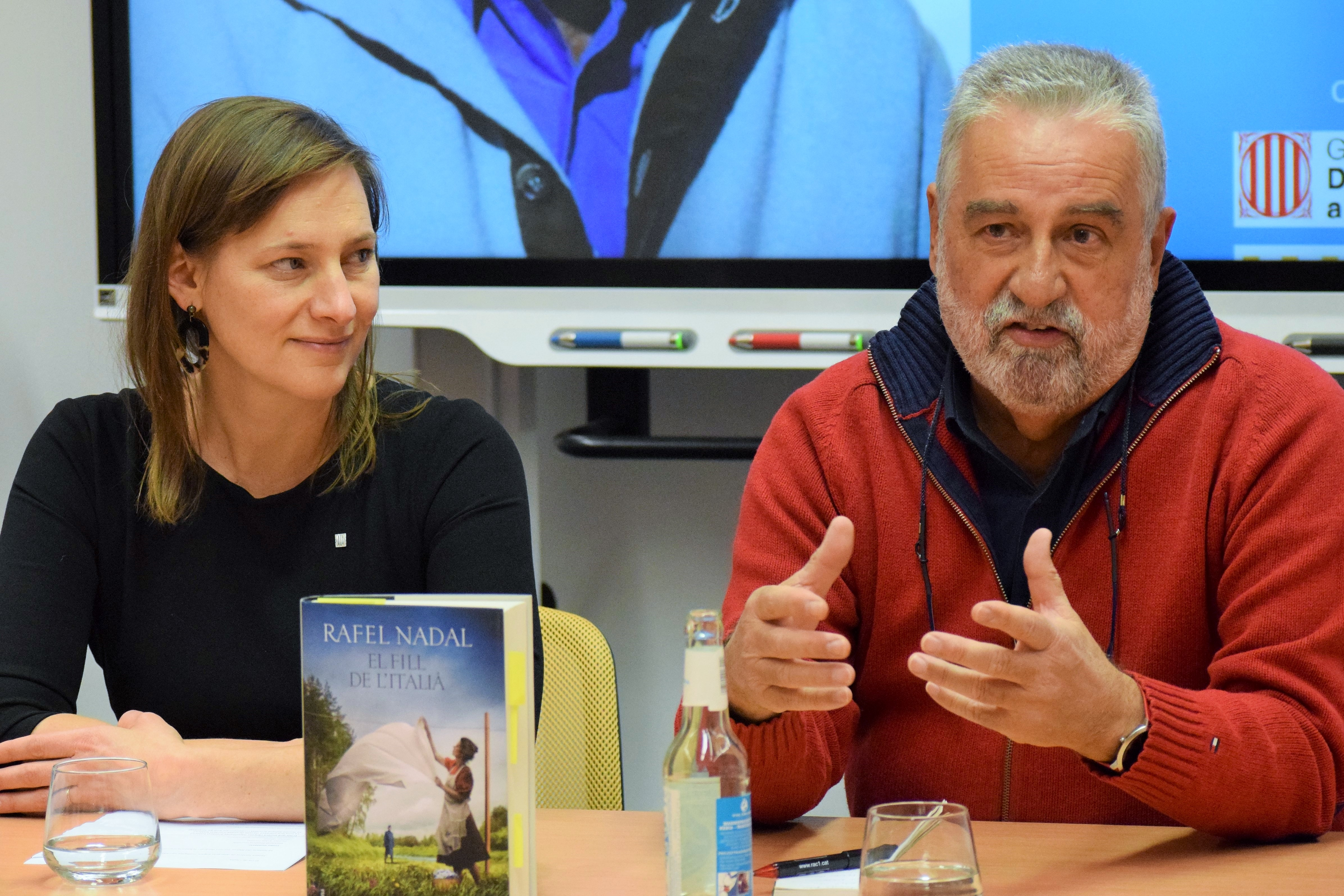 La delegada de la Generalitat de Catalunya a Alemanya Marie Kapretz amb l'escriptor català Rafael Nadal durant la presentació del llibre "El fill de l'italià". L'acte va tenir lloc a la universitat Humboldt de Berlín el novembre de 2019.